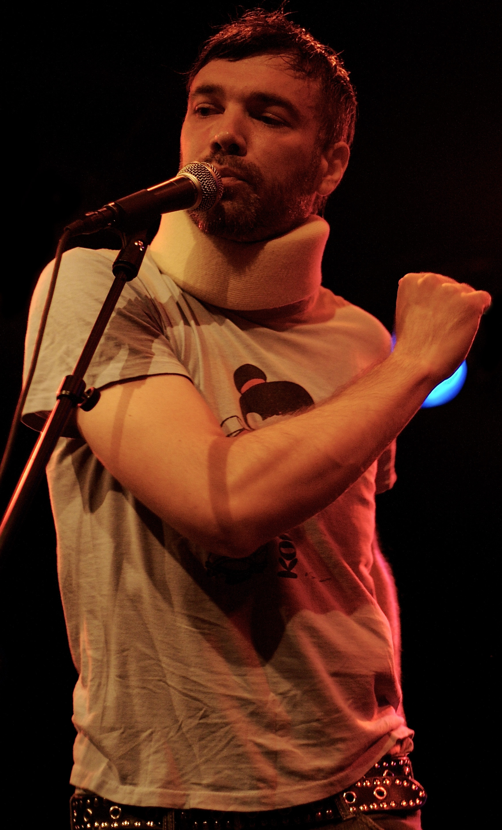 Buck 65 Live @ Storsjöyran, Östersund '07.